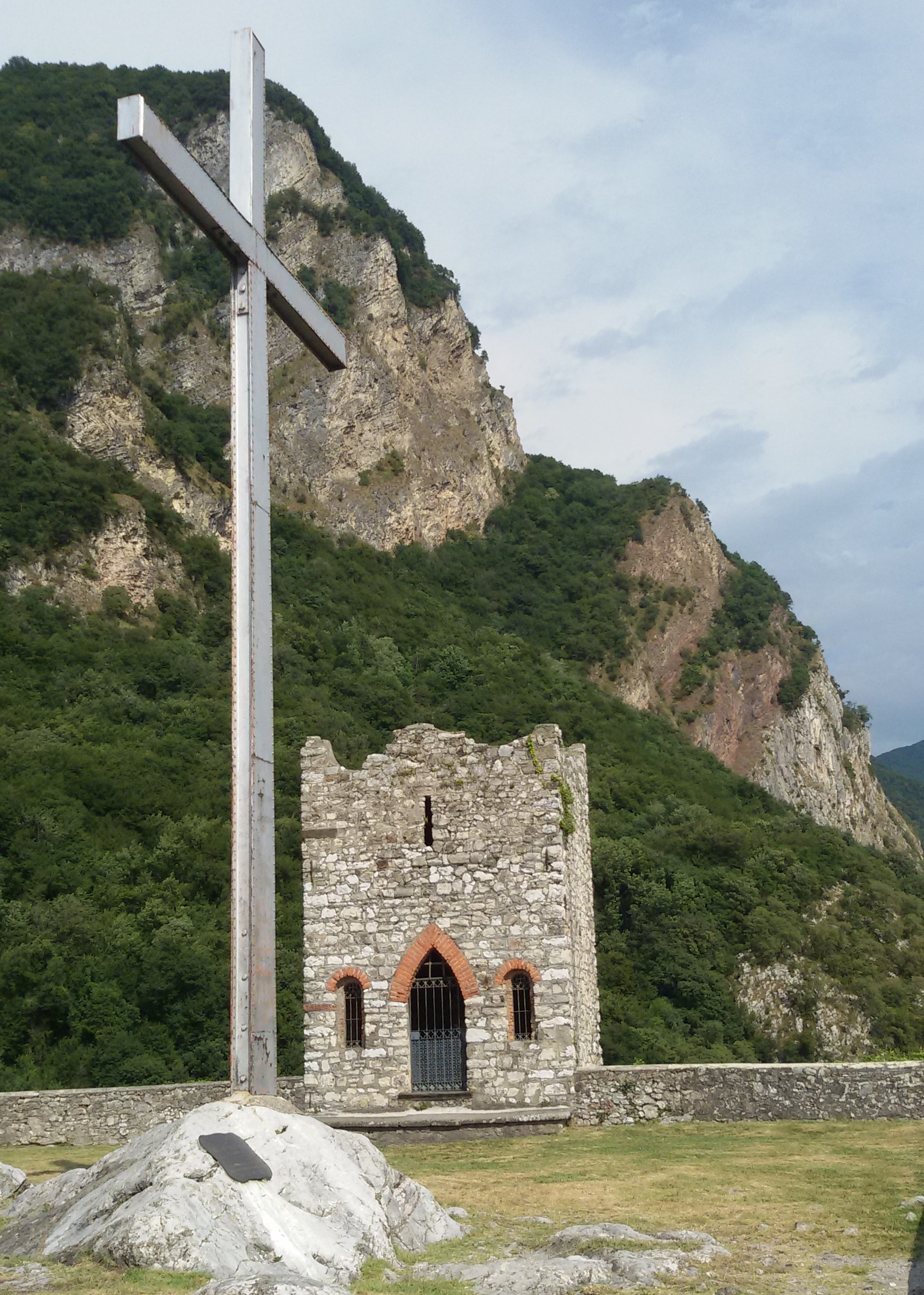 In primo piano si trova la Croce dedicata alla cappellano di guerra Giovanni Battista Pigato, mentre in secondo piano è presente l'ultima cappella dedicata a San Girolamo